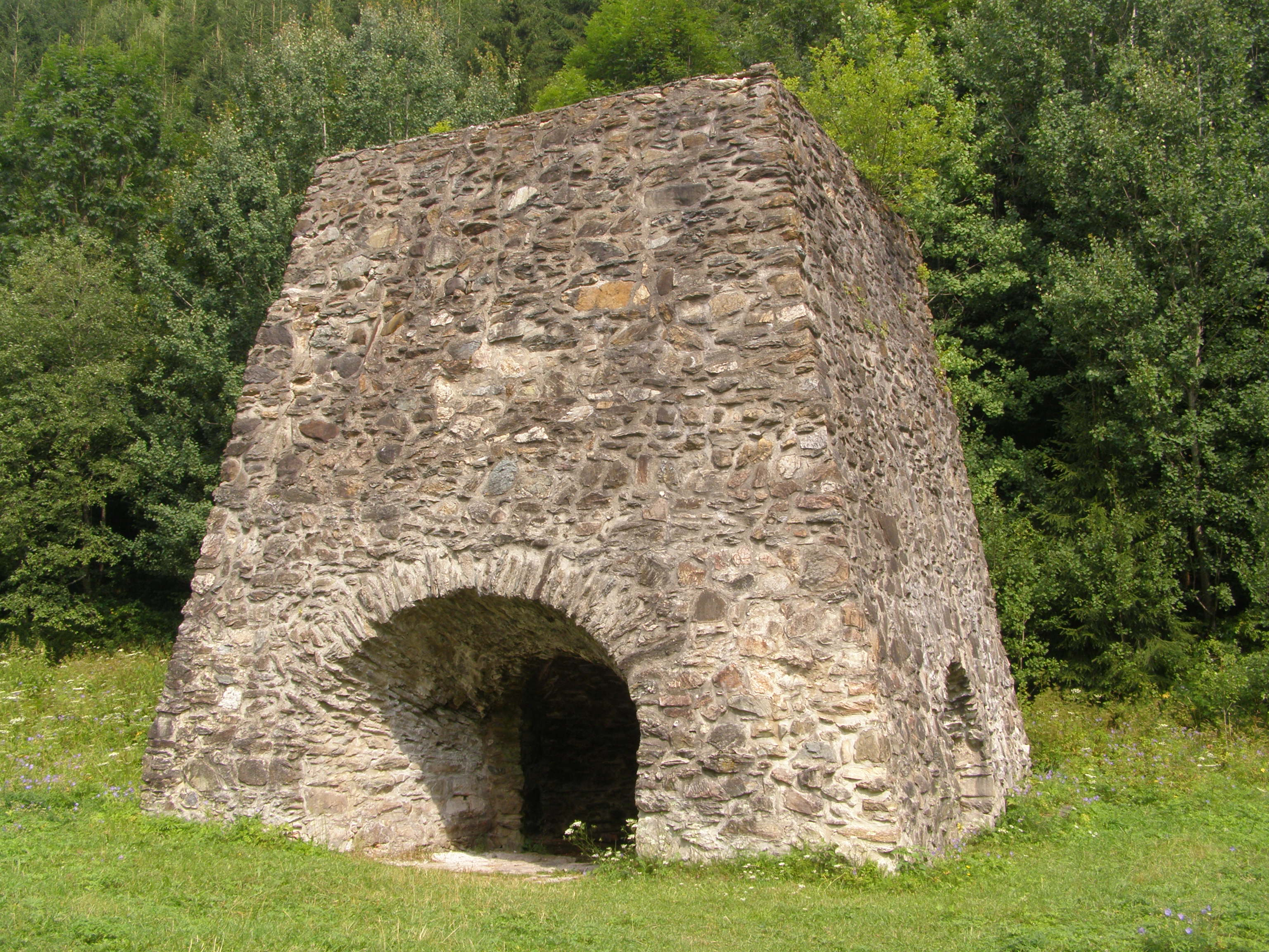 Osrblie, vysoká pec Tri Vody